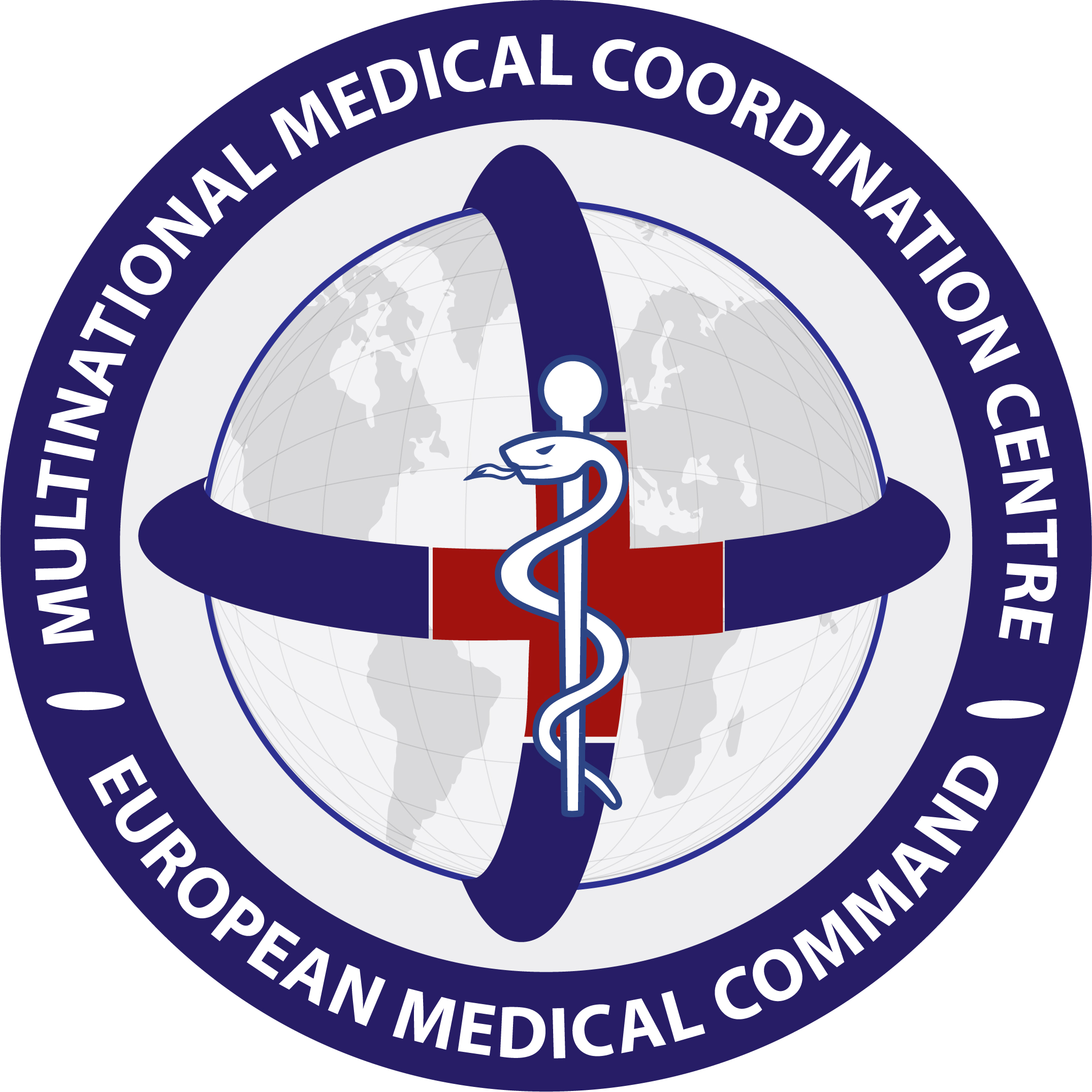 Logo MMCC/EMC - Weltumspannende Wirkung der Sanitätsdienste